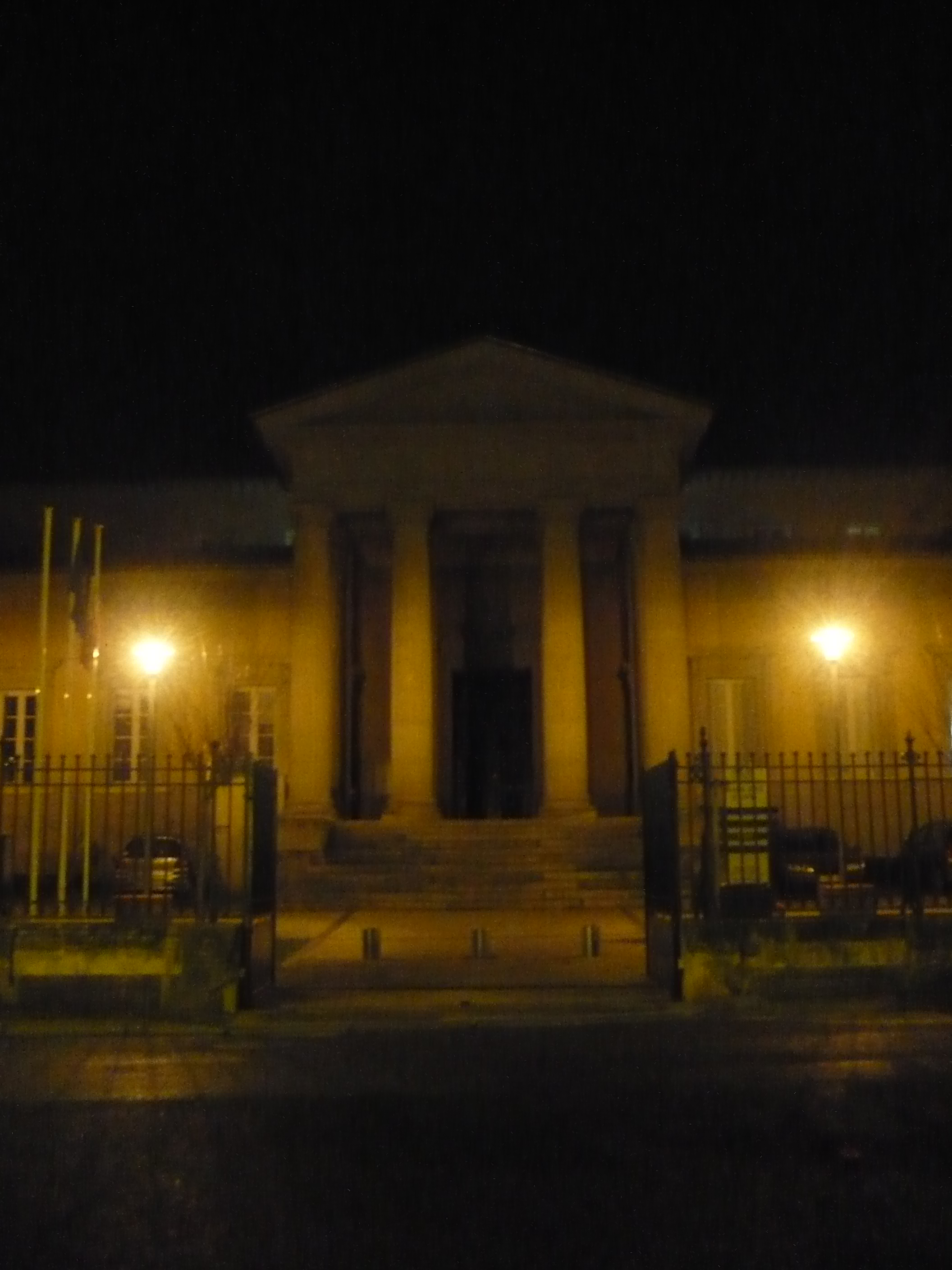 Castres